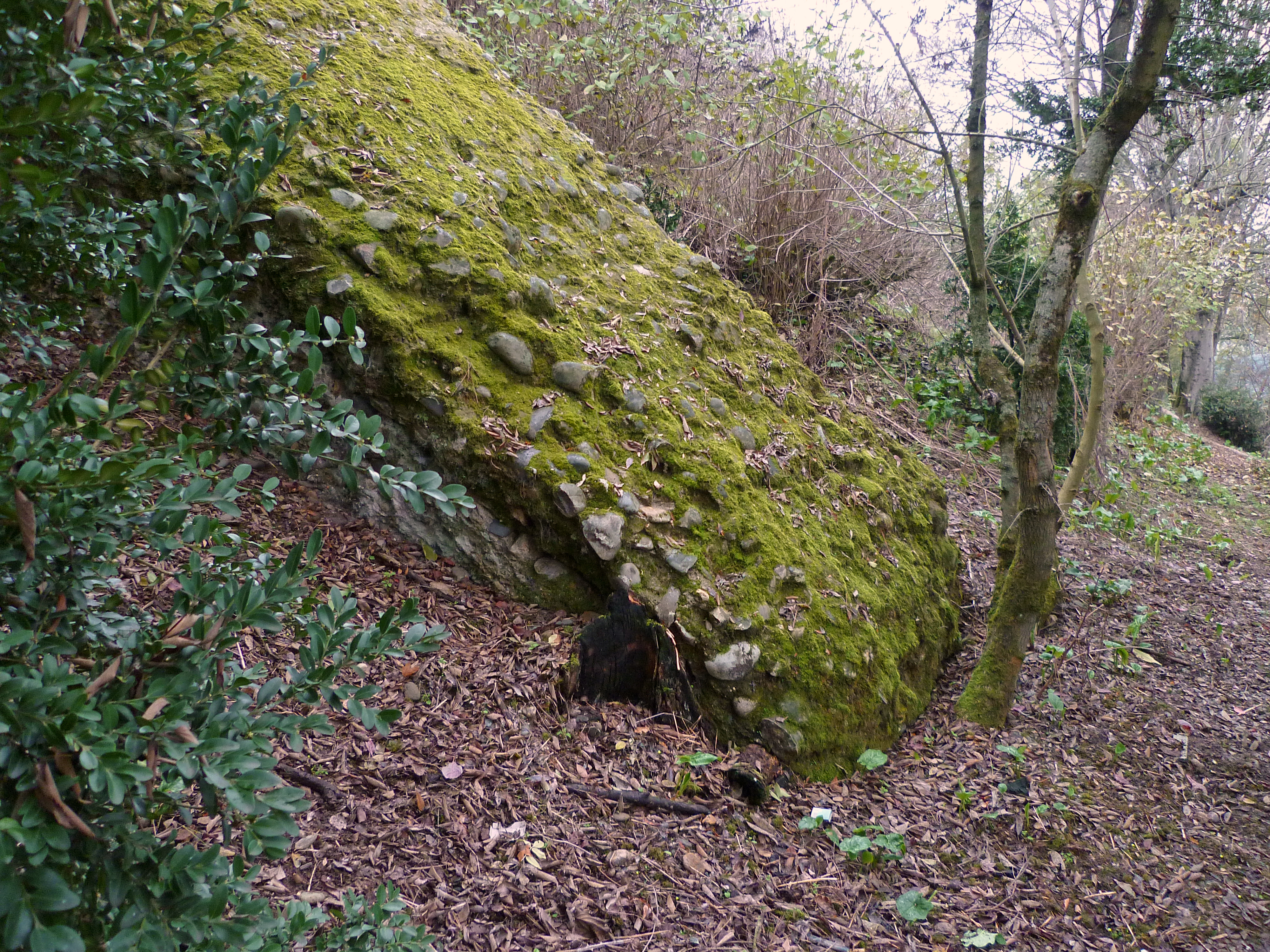 Toulouse (Haute-Garonne, Midi-Pyrénées, France) : Ruines à Saint-Michel-du-Touch.